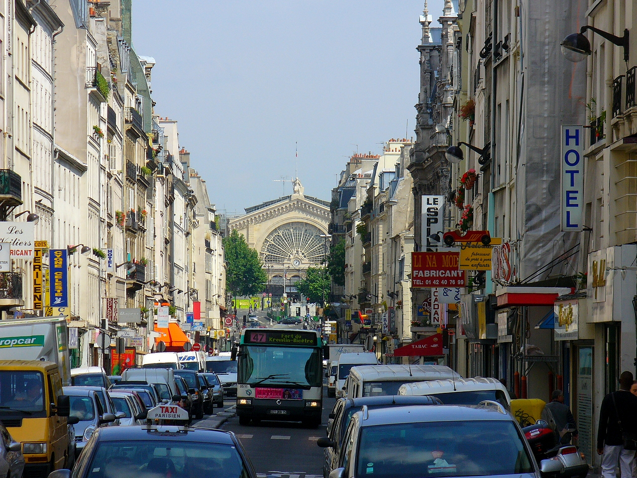 Paris